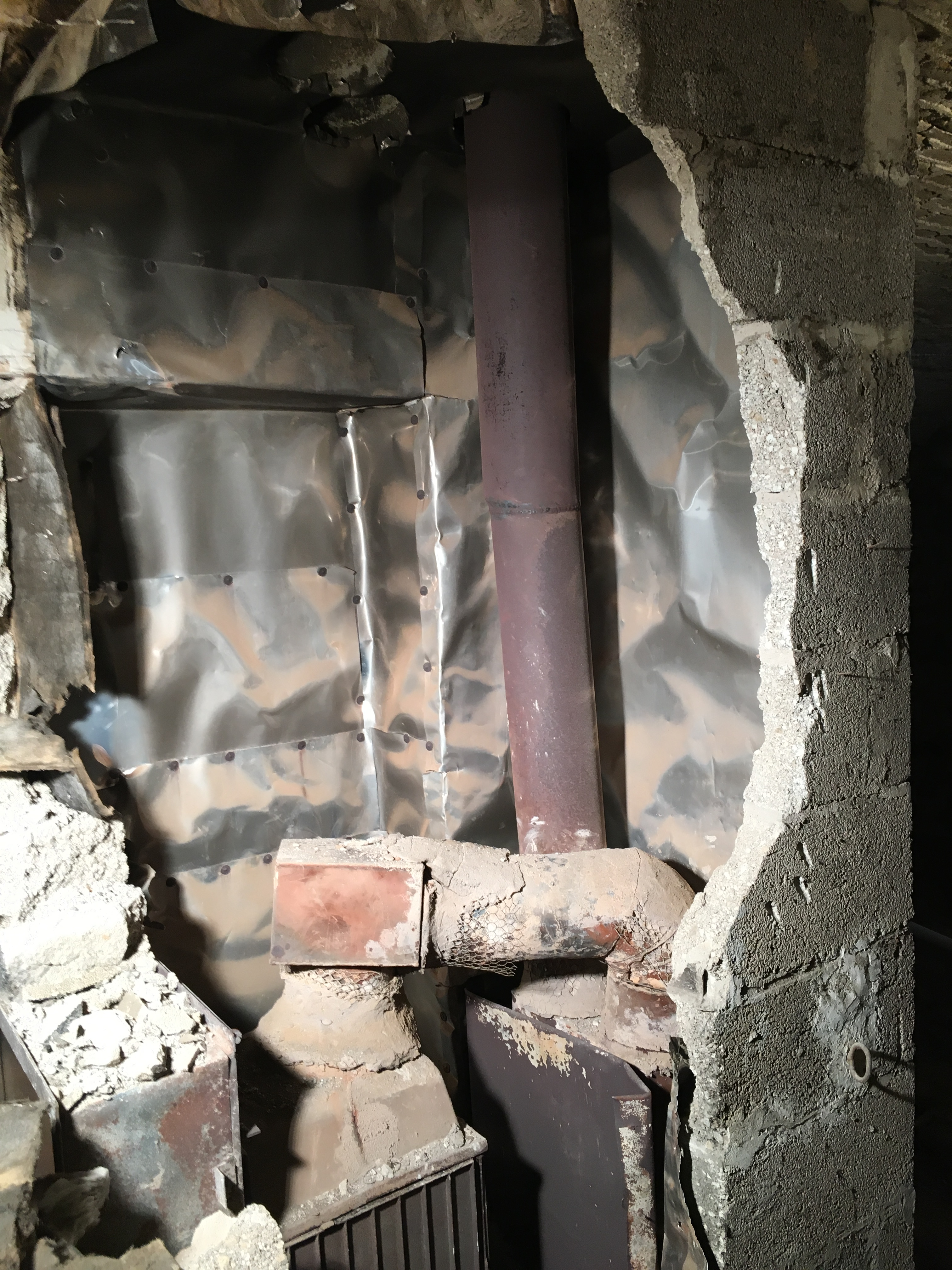 Innenansicht einer Warmluftheizung. Im Hintergrund oben der gemauerte und mit Blech verkleidete Kanal für die kalte Raumluft, davor das Blechrohr für die Abgase, das in den Schornstein mündet. Unten links im Bild die Brennkammer.